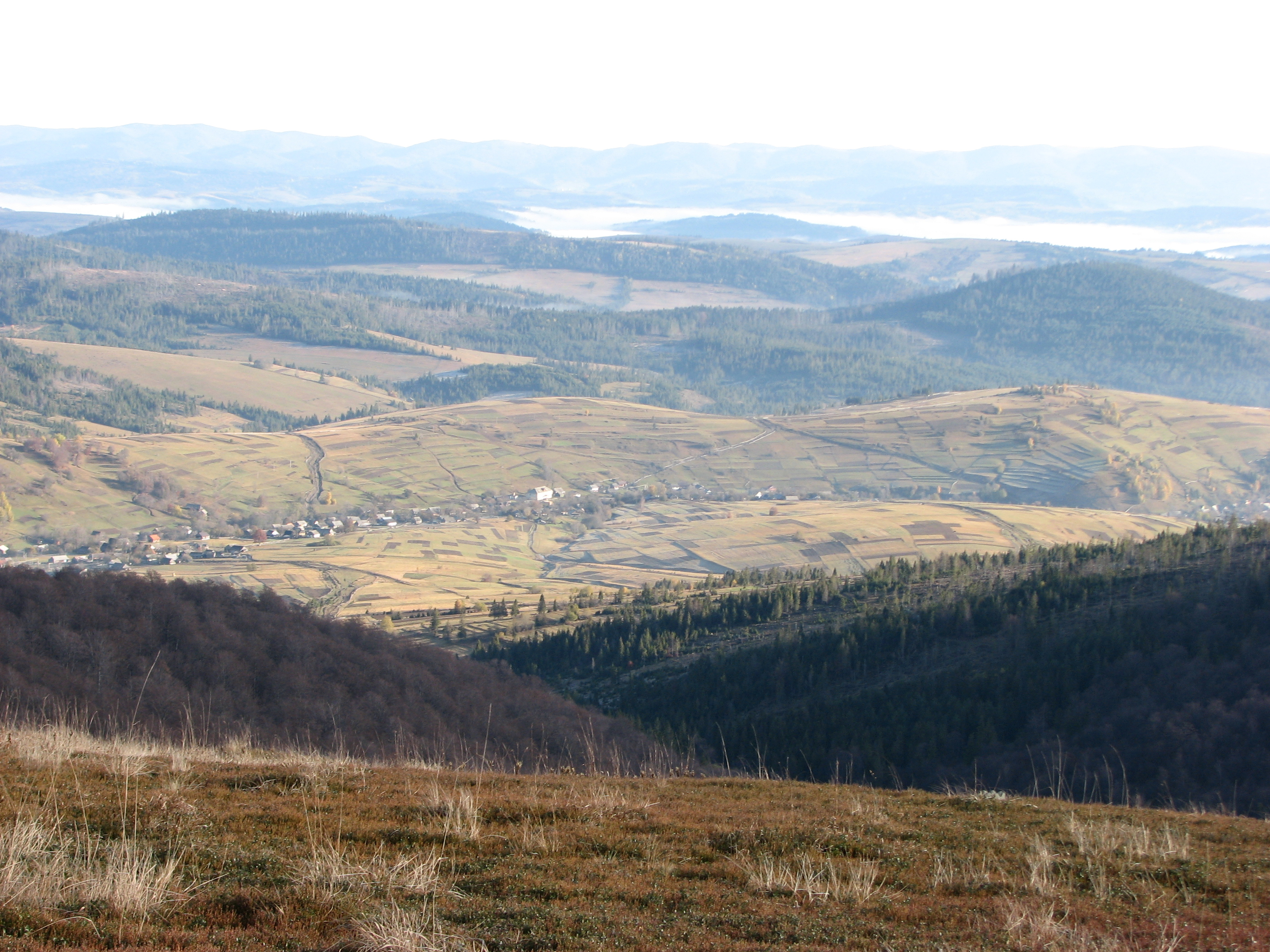 с. Либохора (Турківський р-н)